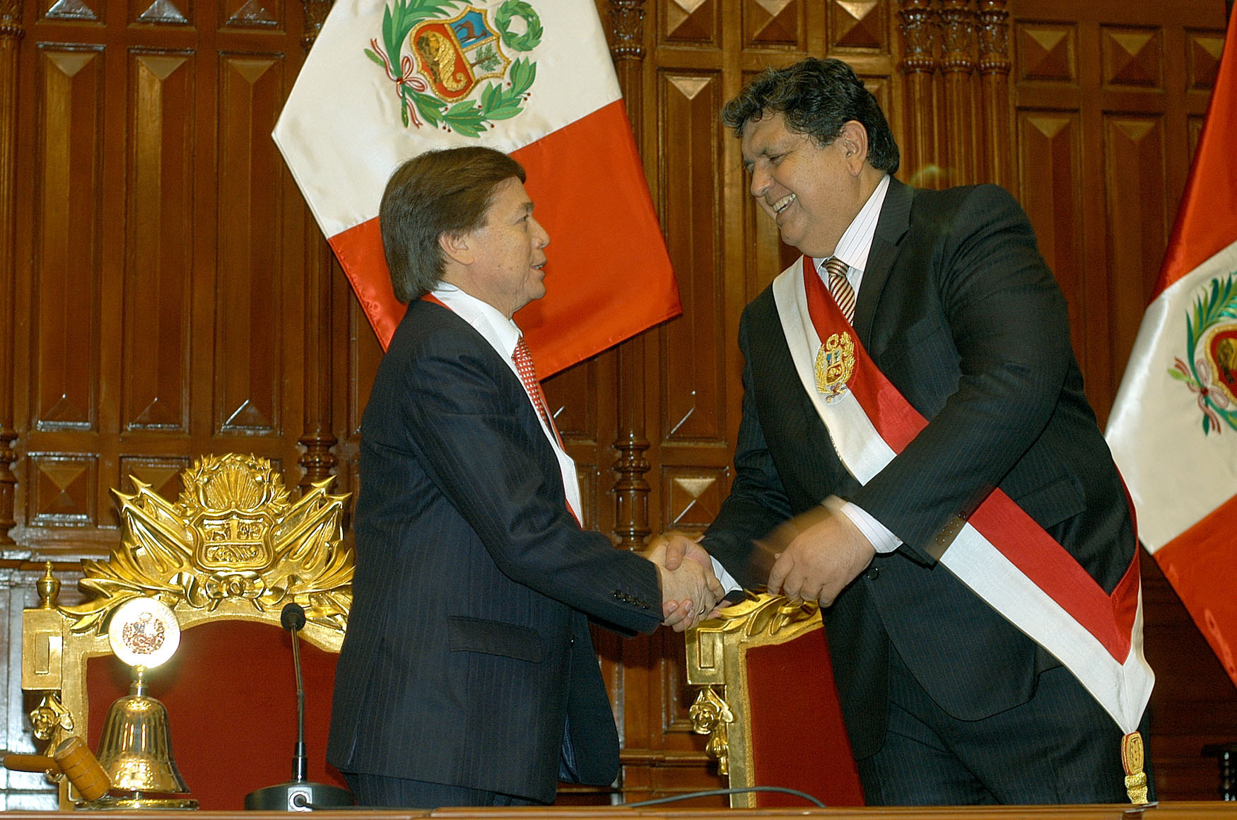 El presidente Alan García Pérez se despide del titular del Legislativo, César Zumaeta, luego de dirigir su Mensaje a la Nación en Sesión Solemne del Congreso de la República.